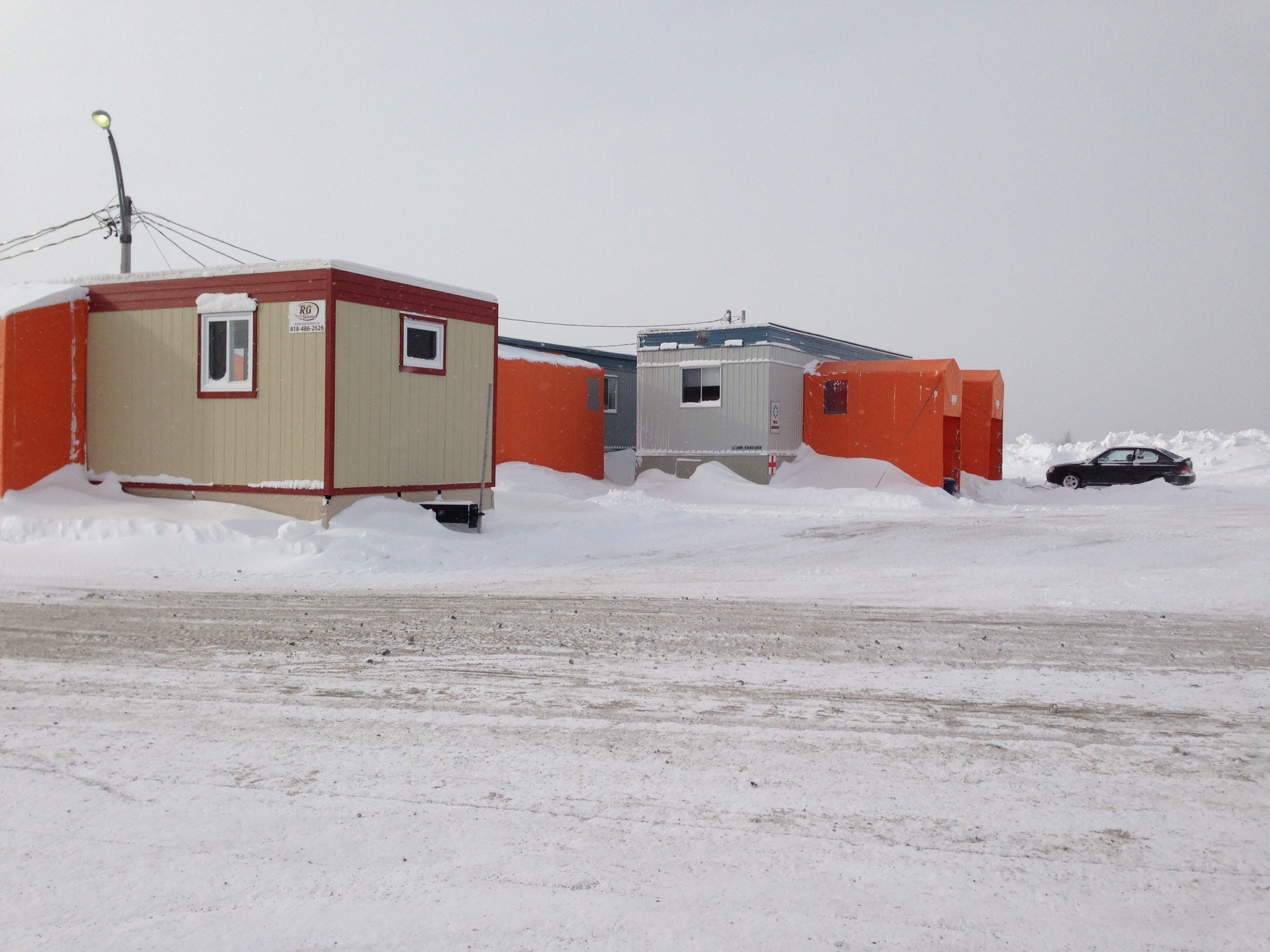 Camp du site minier de Fire Lake au Québec près de Fermont